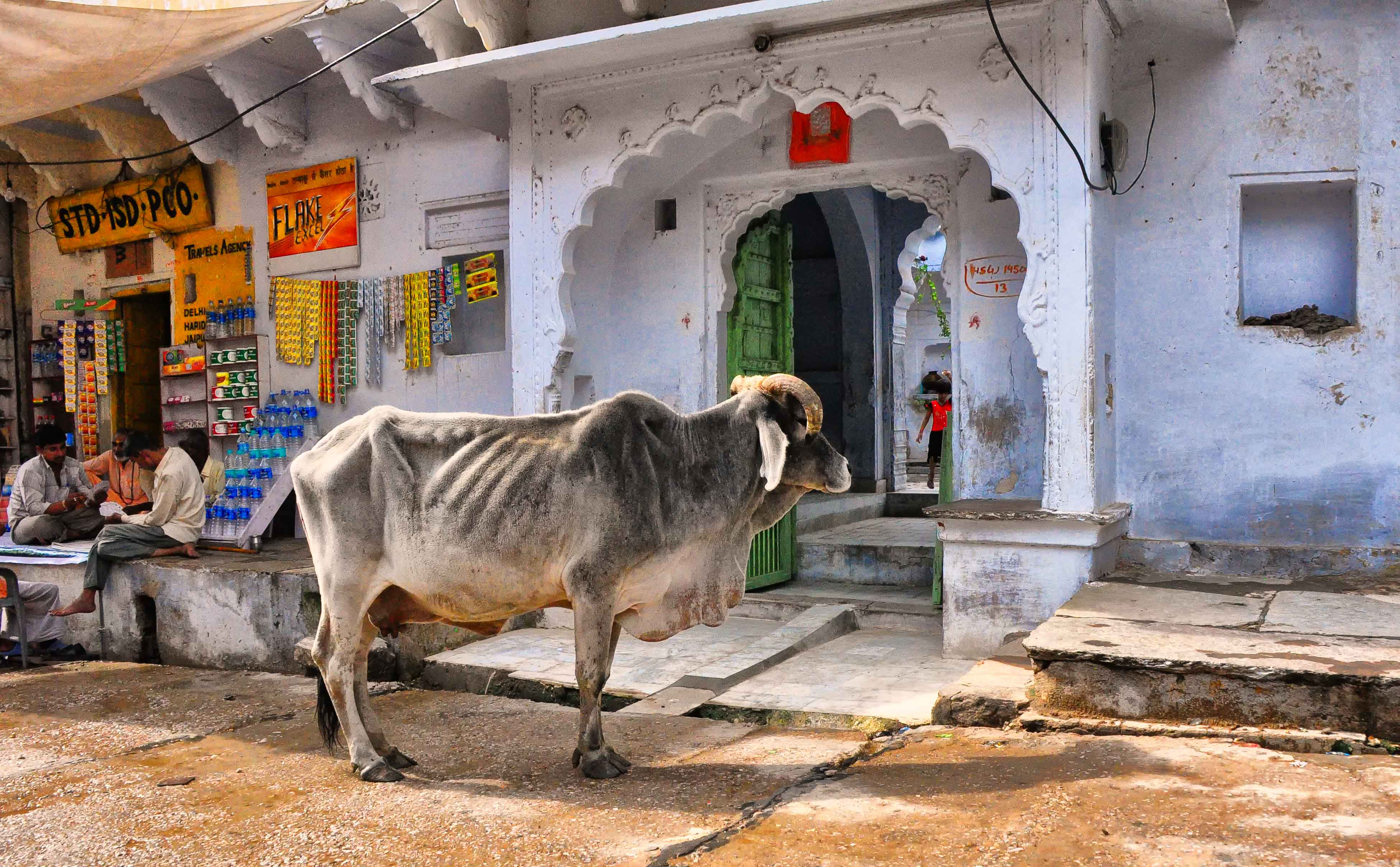 Pushkar, India